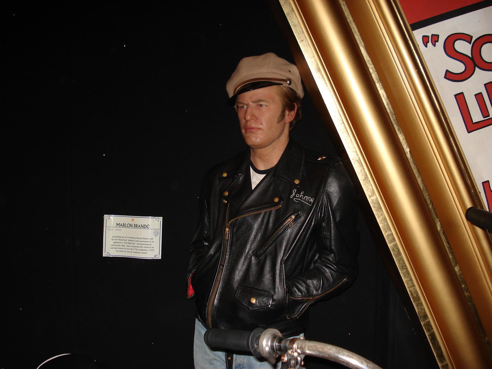 Mme Tussaud museum